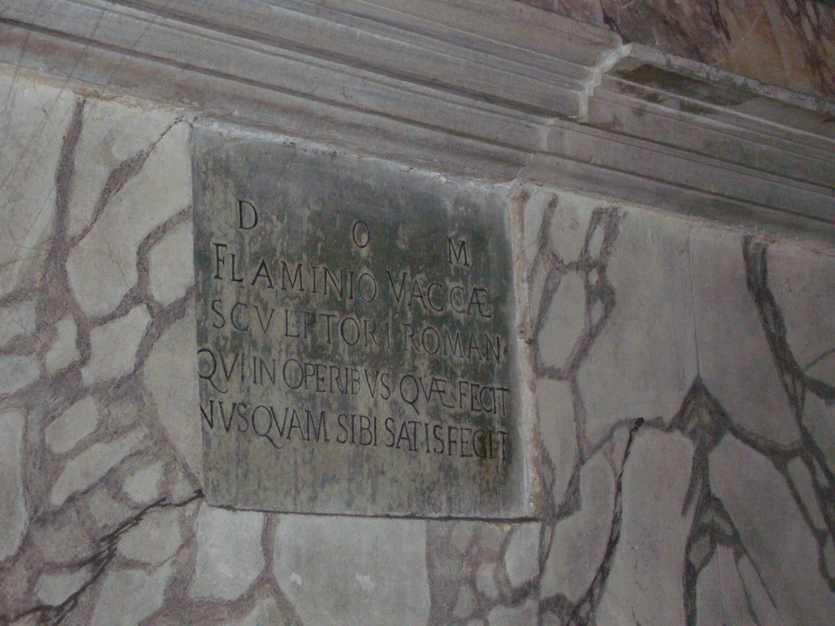 Roma, Pantheon: lapide di Flaminio Vacca (membro dell'Accademia dei virtuosi del Pantheon)